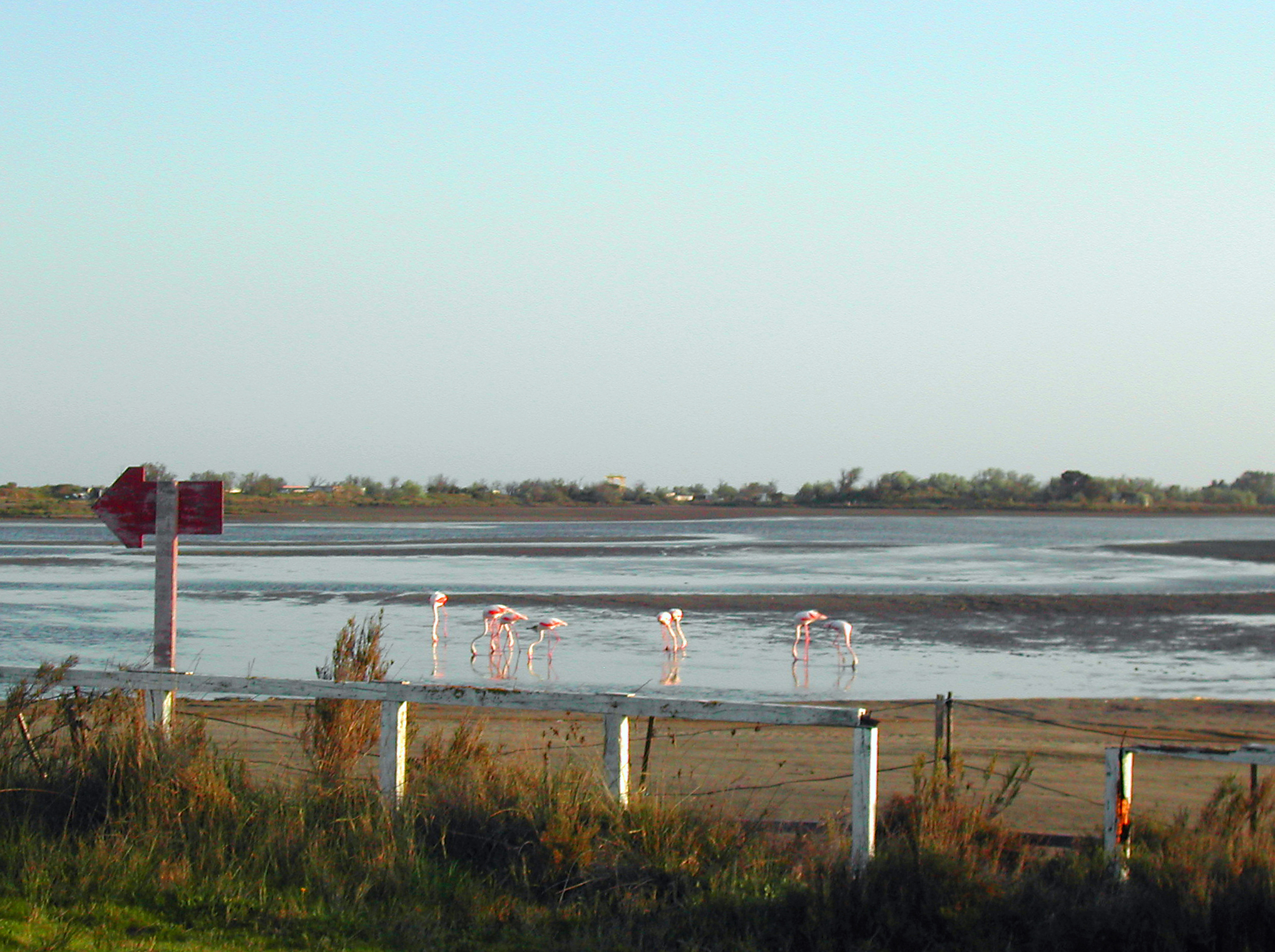 Flamands se nourrissant dans la lagune à Beauduc